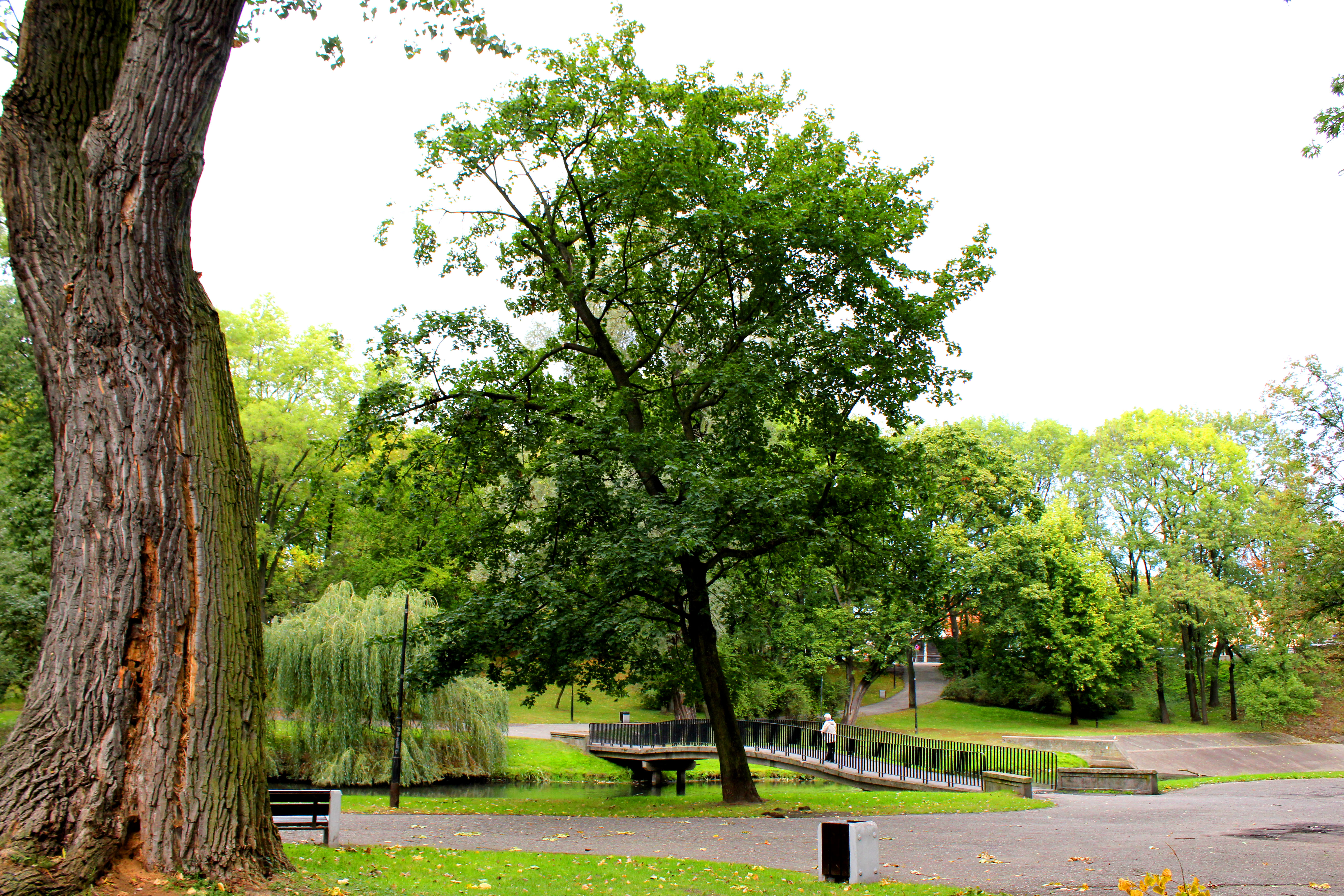 park miejski im. H. Sienkiewicza, XIX/XX Włocławek, miasto Włocławek